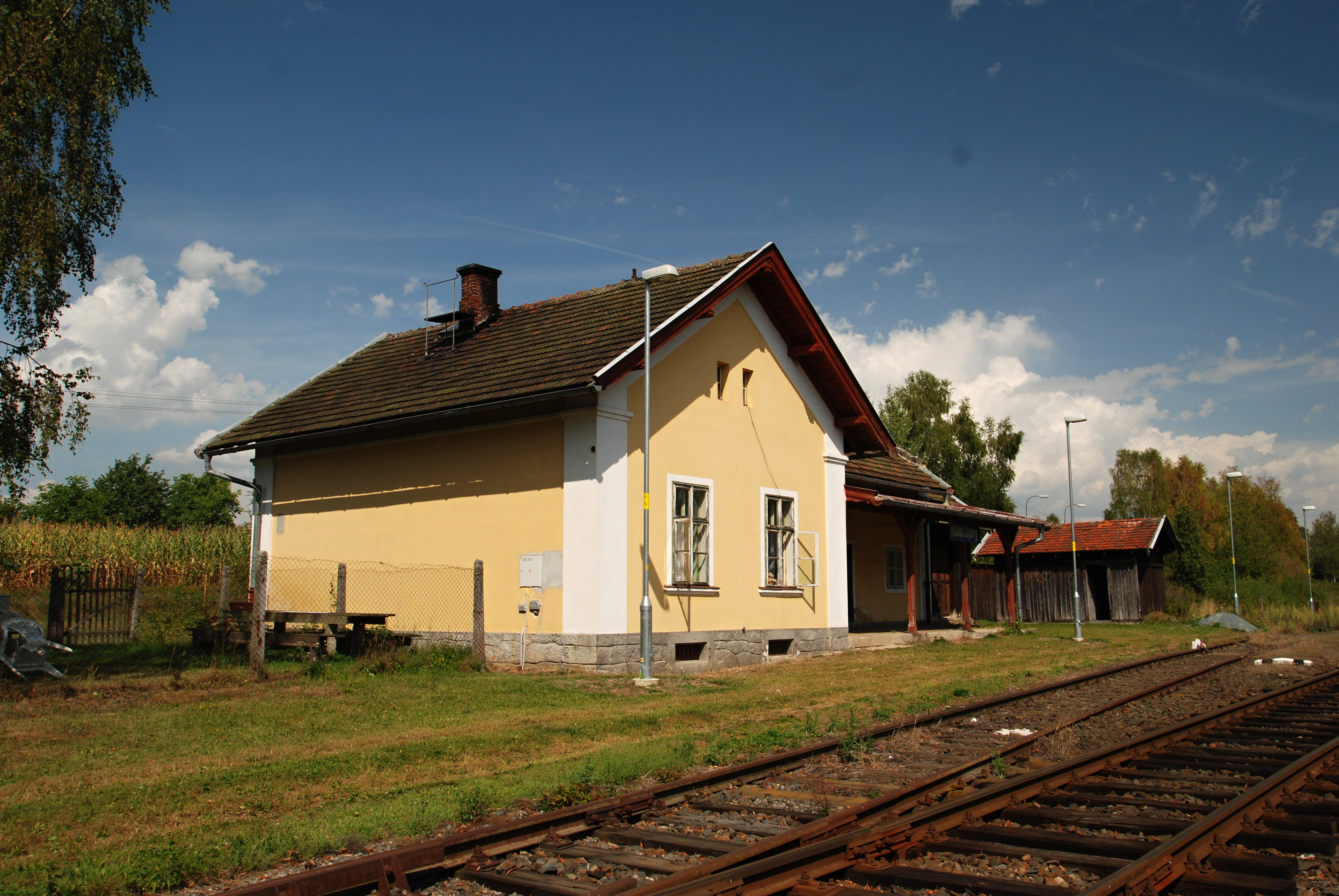 Obec Holostřevy v okrese Tachov